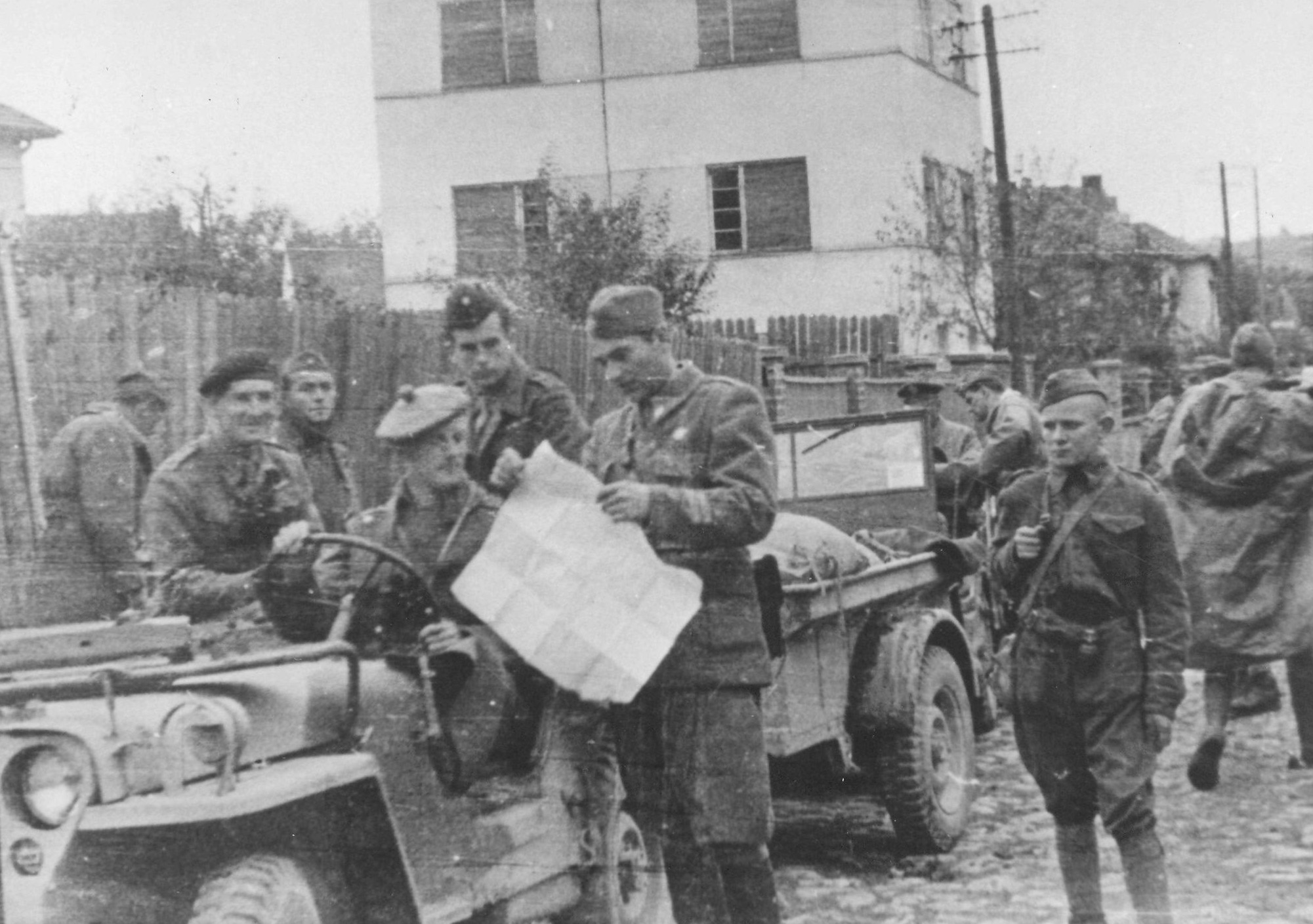 Srpskohrvatski / српскохрватски: Savo Drljević u razgovoru sa britanskom vojnom misijom oktobra 1944. u Beogradu.